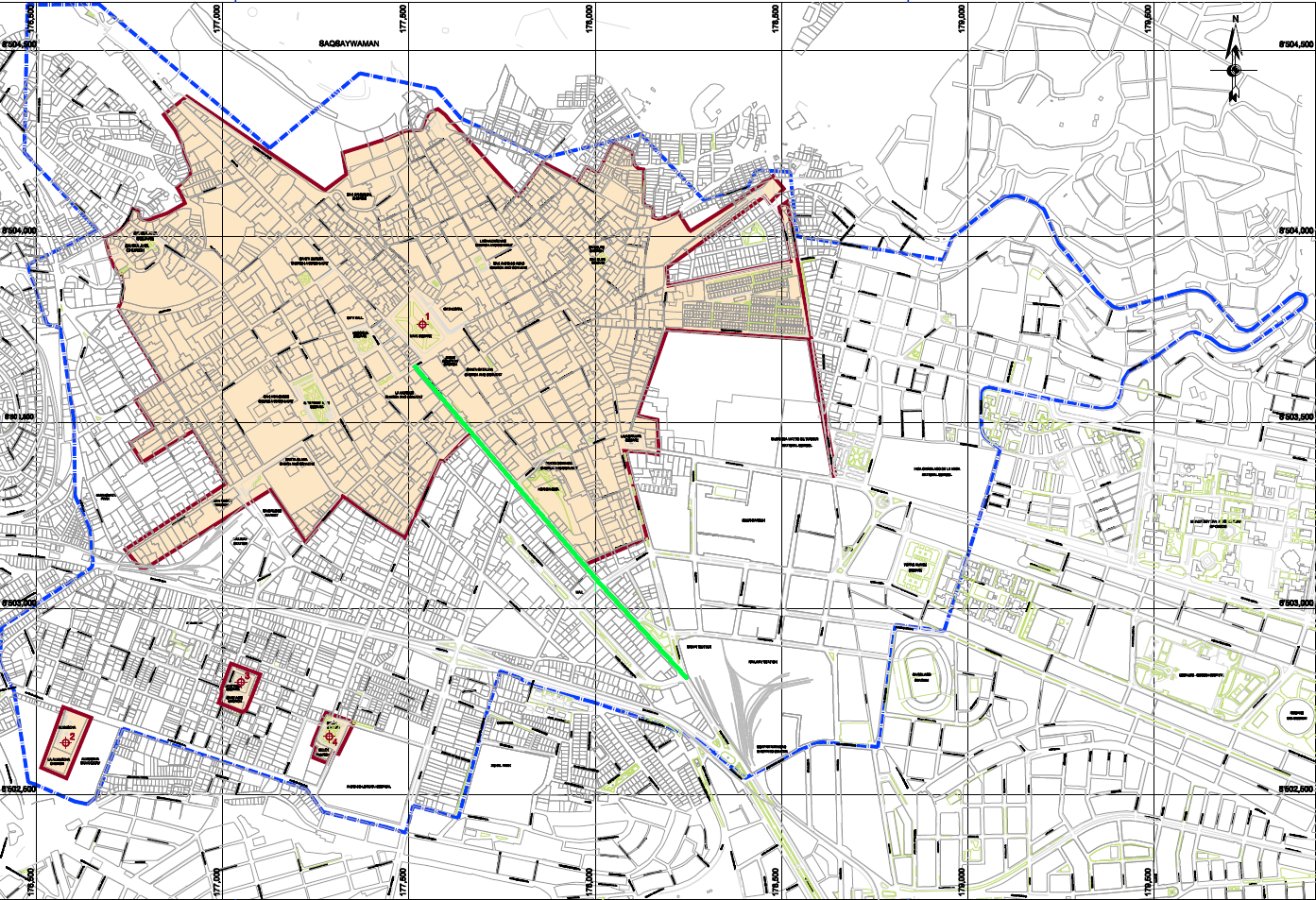 Trazo de la Avenida El Sol dentro de la ciudad del Cusco